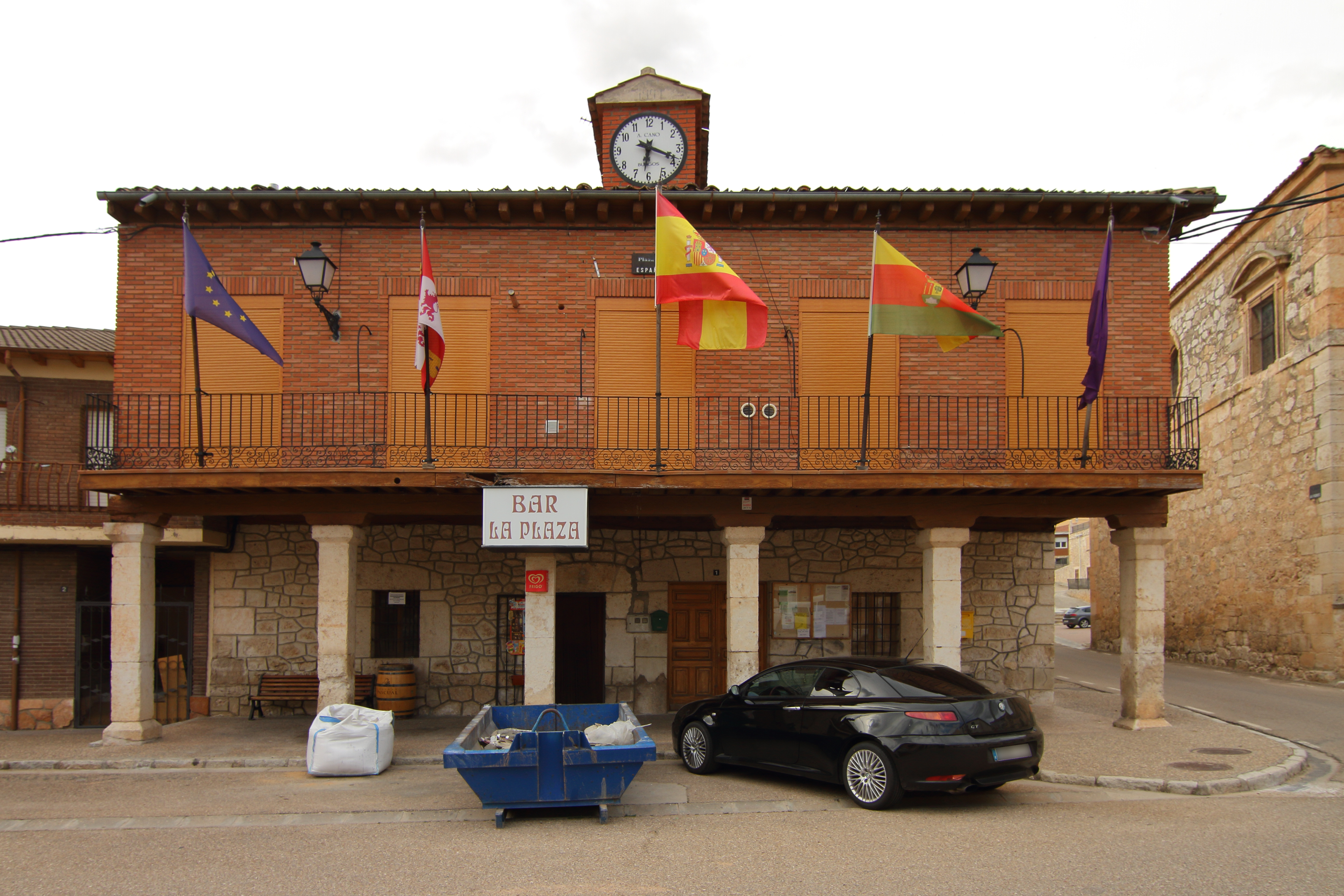 Fuentelcésped, Casa Consistorial